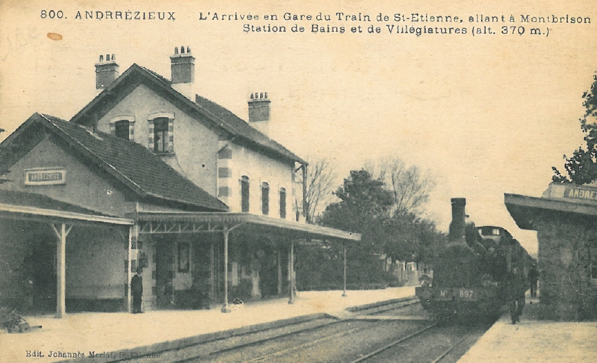 Andrézieux. L'arrivée en gare du train de Saint-Etienne, allant à Montbrison. Station de Bains et de Villégiatures (collection Château de Bouthéon)